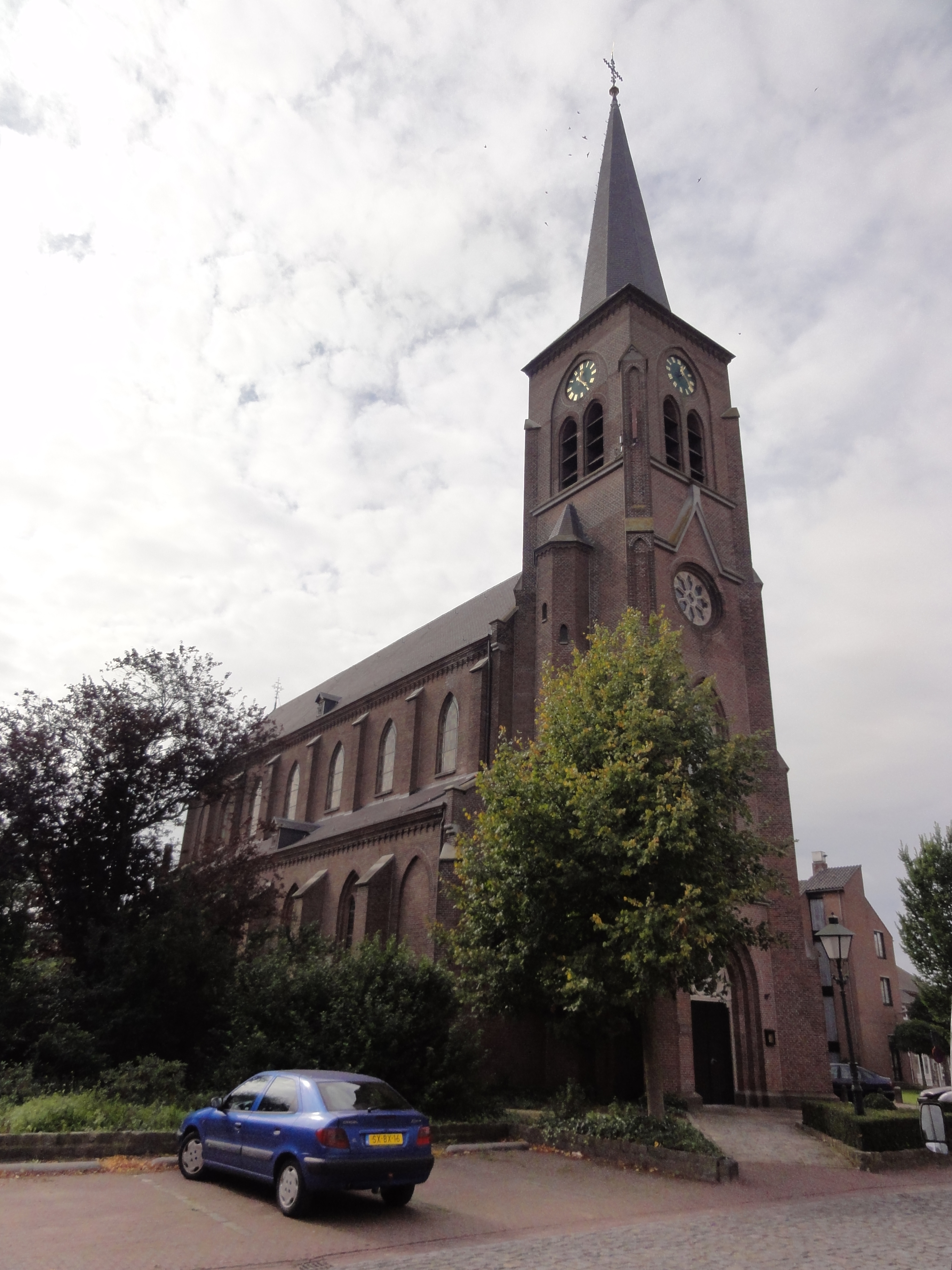 Megen Rijksmonument 28540 St.Servatiuskerk vooraanzicht Schoolstraat 1 58″ N, 5° 33′ 55.85″ E Object location51° 49′ 21.34″ N, 5° 33′ 49.46″ E